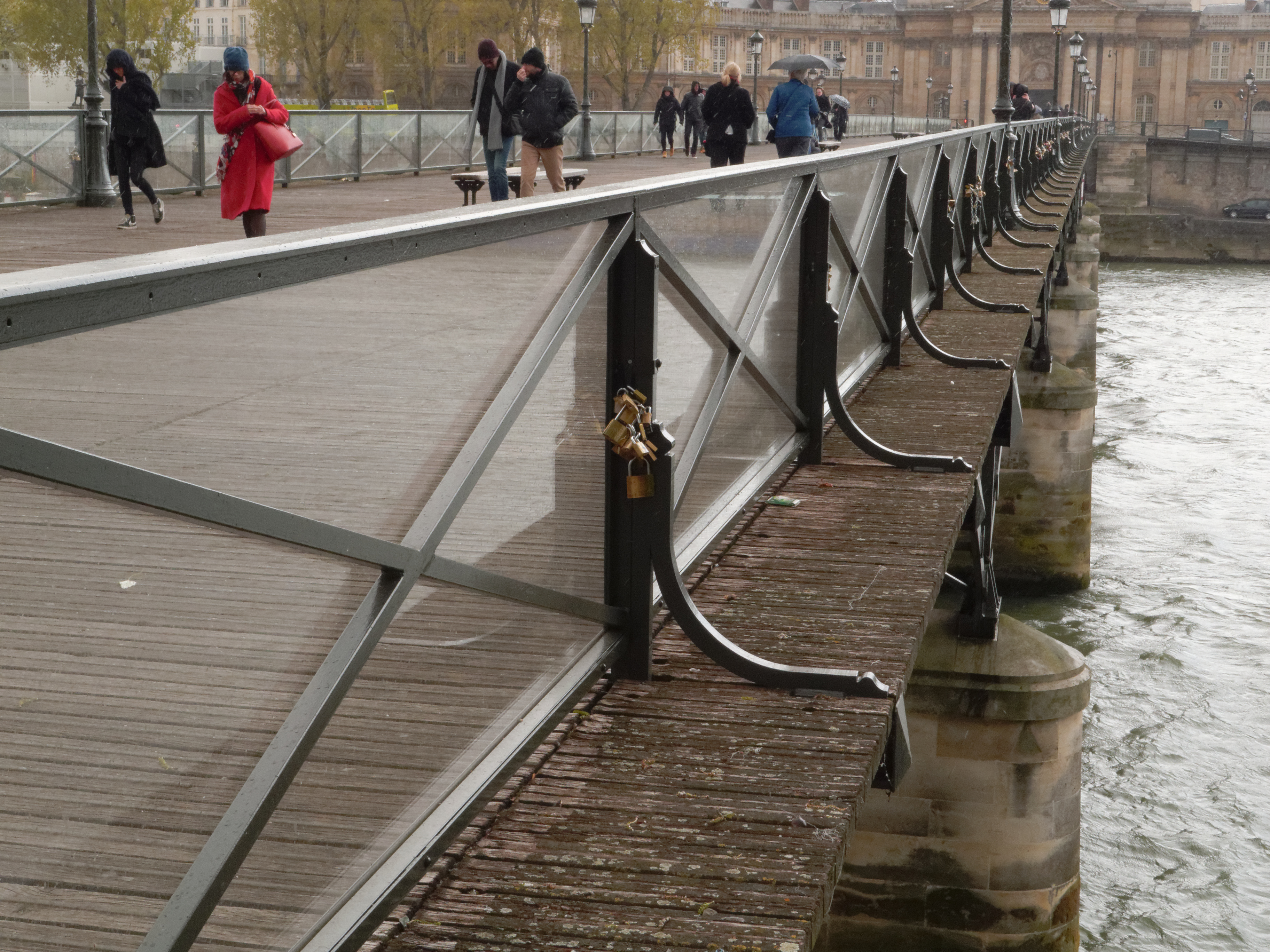 Paris : cadenas d'amour sur le pont des Arts.